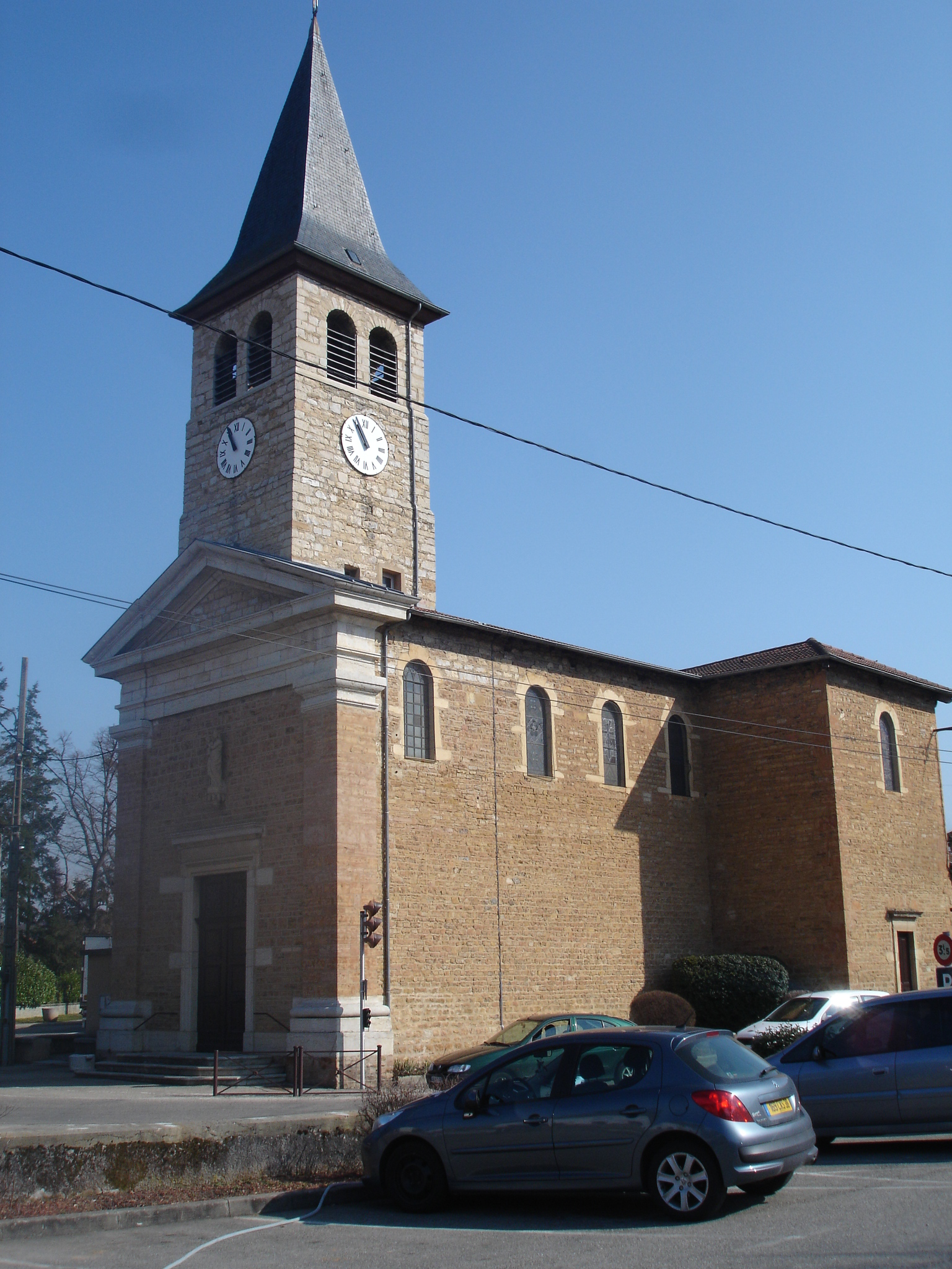 Chamagnieu (38) : L'église vue de profil